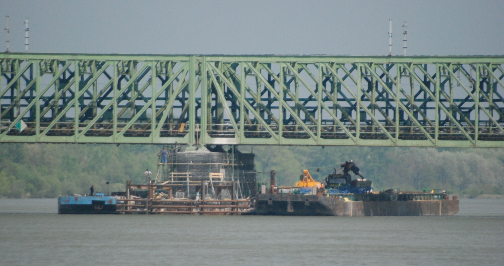 Sanierung der Brückenpfeiler der Tullner Donaubrücke (Niederösterreich).